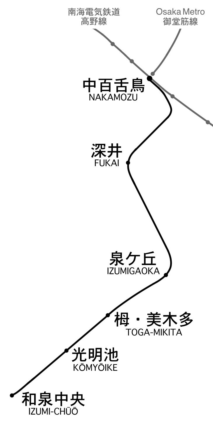 泉北高速鉄道線 簡易路線図